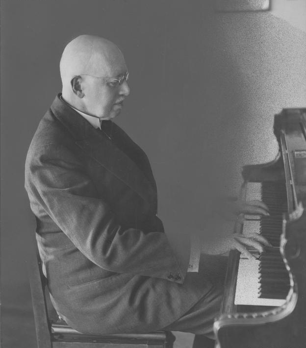 Aleksander Michałowski (Warszawa)